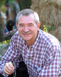 Юрій Манцевич